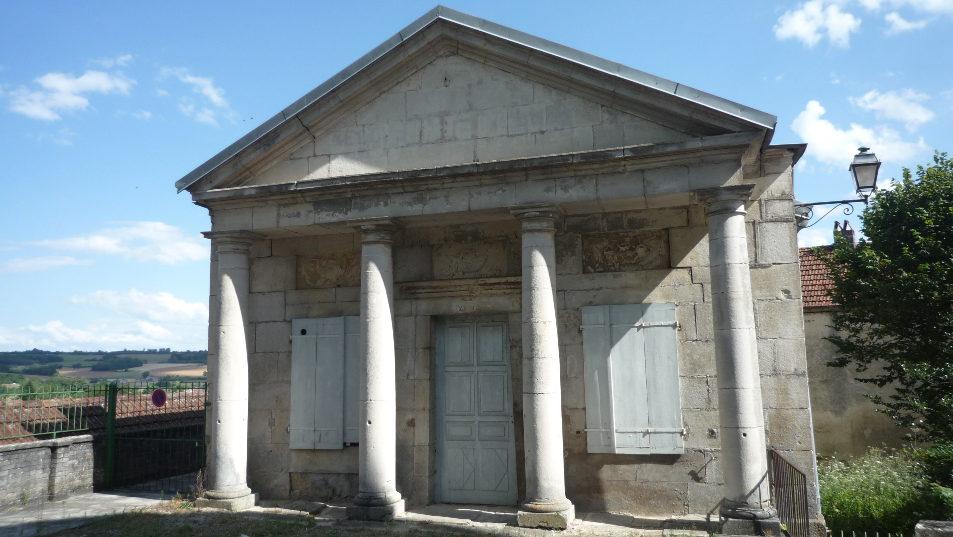 Façade à fronton de l'ancienne orangerie du château de Champlitte